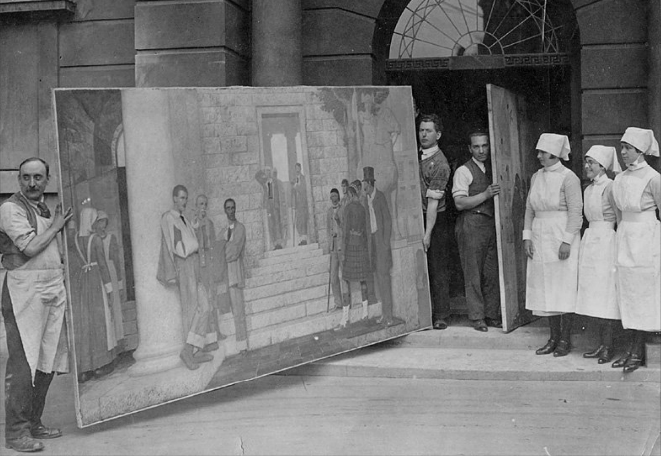 Неизвестный английский фотограф, снимок сделан в Лондоне в 1920 году.